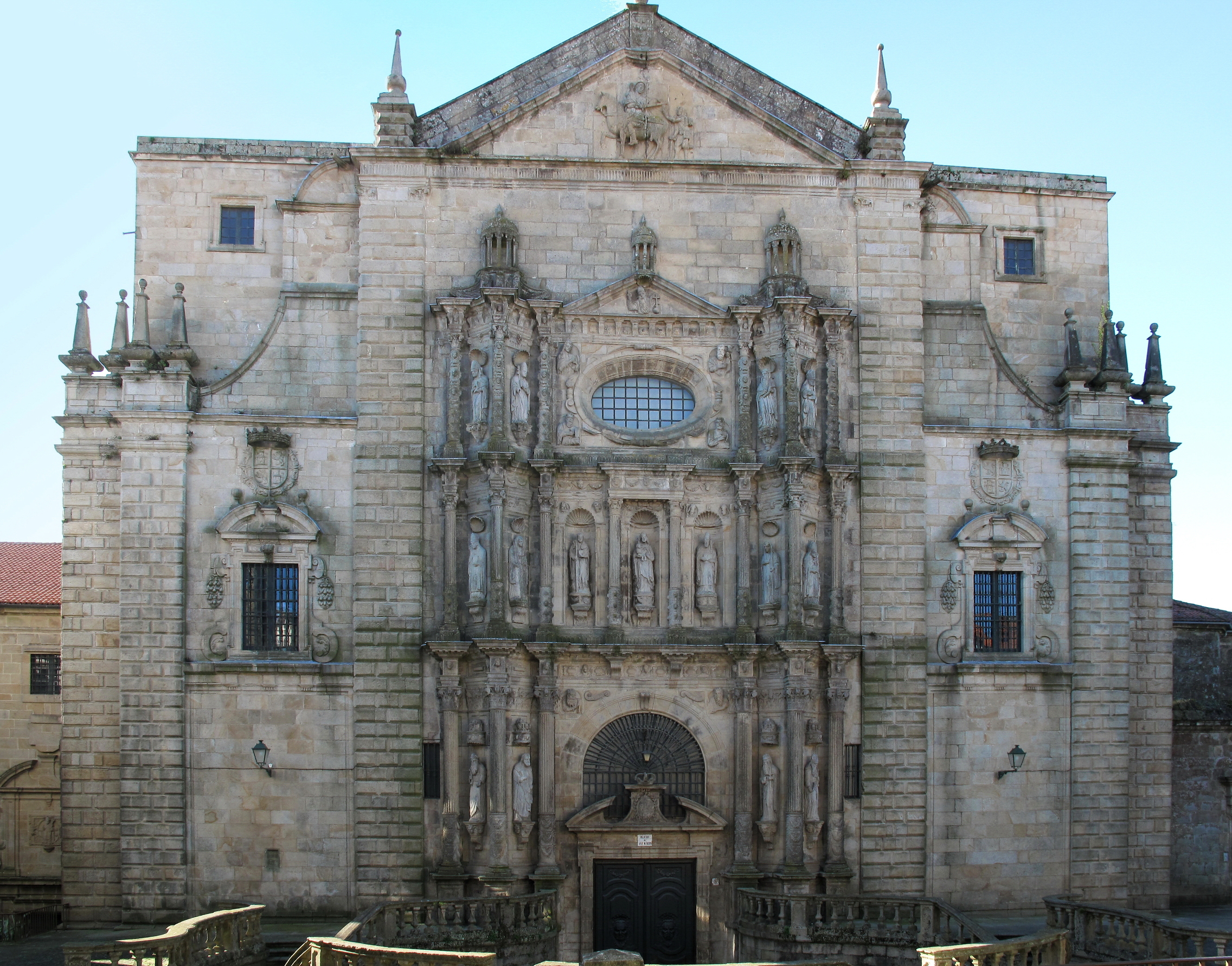 Fachada de la Iglesia del monasterio de San Martín Pinario - Santiago de Compostela